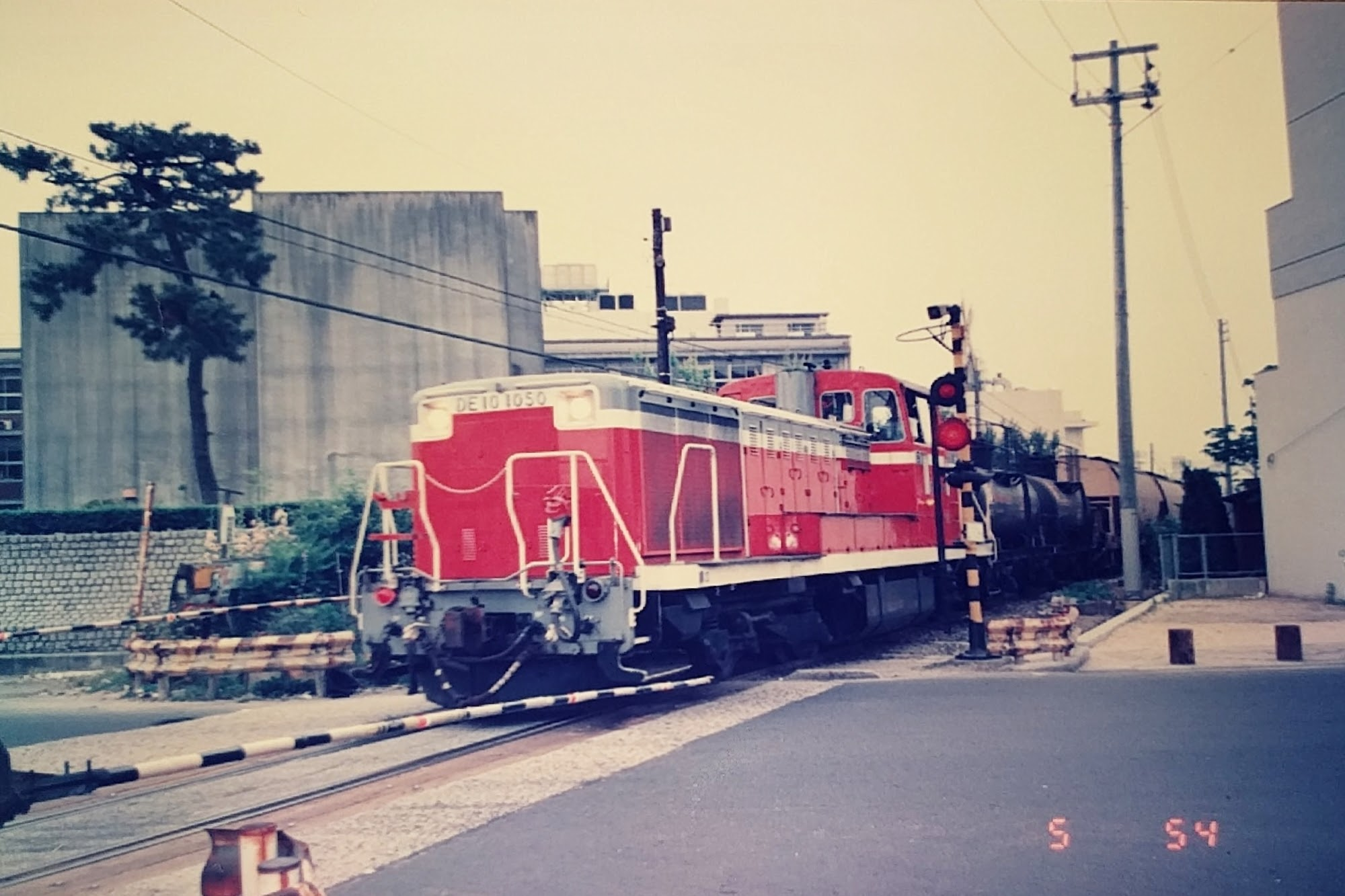 東広島貨物駅行きの上り貨物列車。国道2号線を渡った広島大学病院前の踏切から南望。旧上大河駅付近。現在の広島霞郵便局前付近。1986年6月11日午前5時54分。